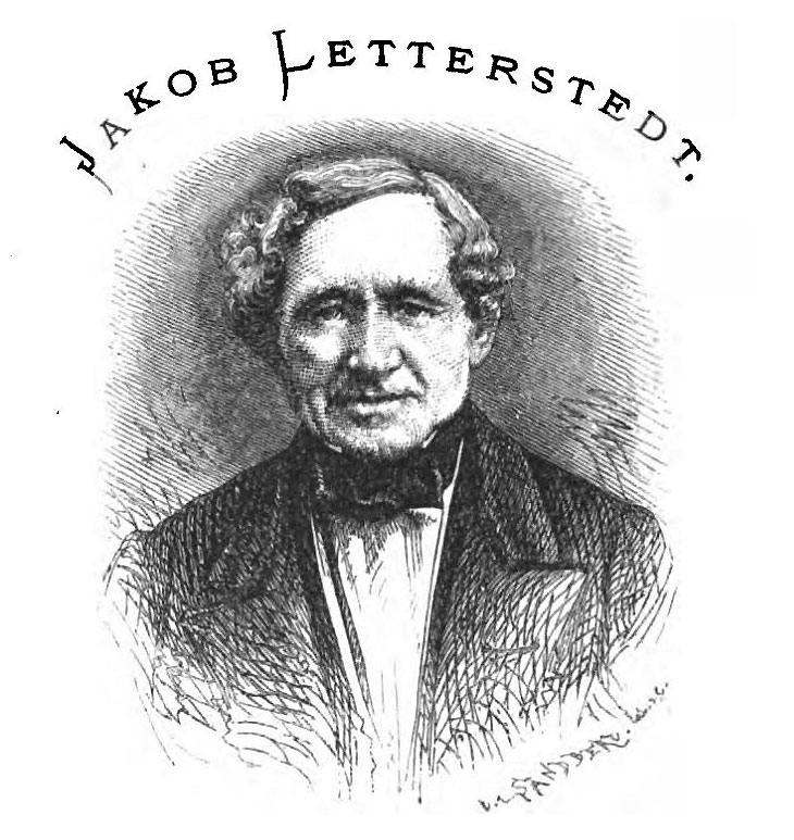 Jacob Letterstedt (1796-1862)